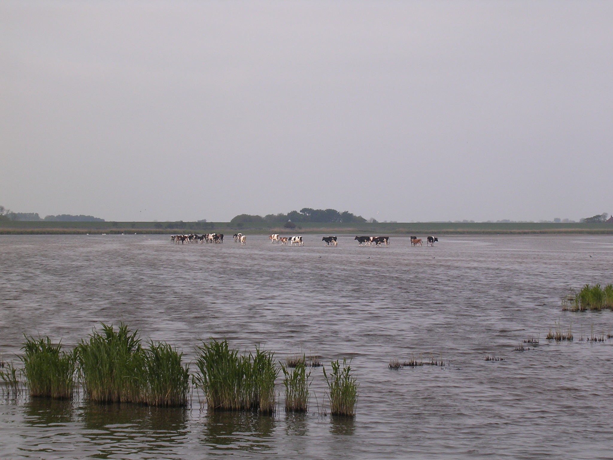 Kij yn it wiete part fan de Ezumakeech sykje in droeg plakje, as wat gêrs (as se binne gewoan it paad kwyt.